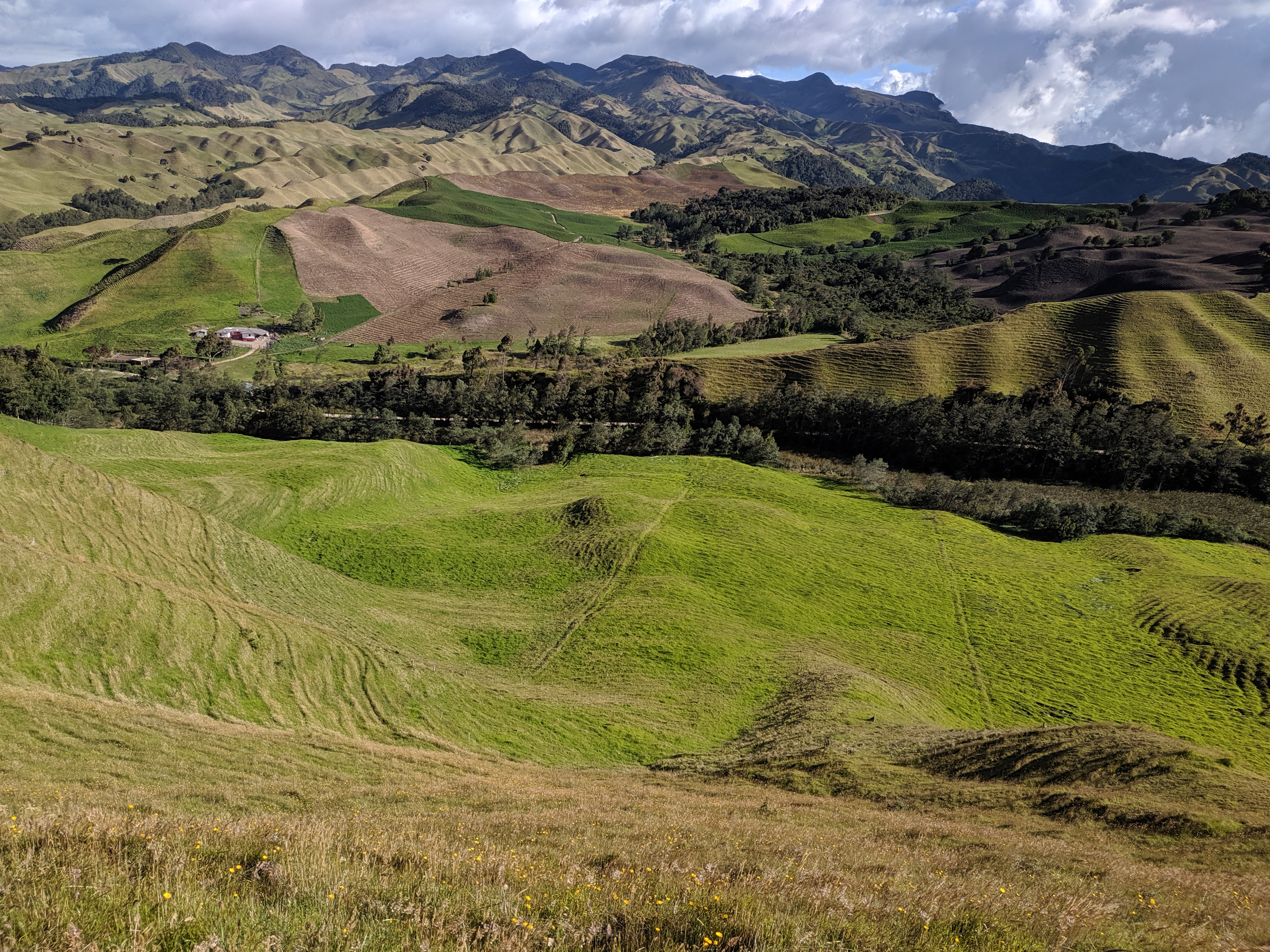 Nacimiento del Río Guarinó. Vereda Páramo ( Marulanda - Caldas - Colombia)